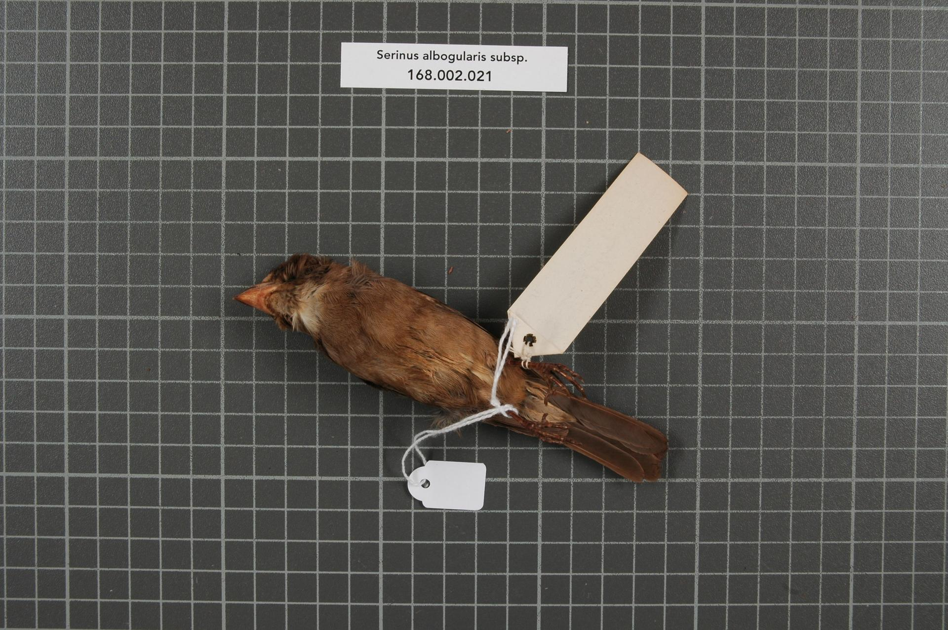 Serinus albogularis subsp.